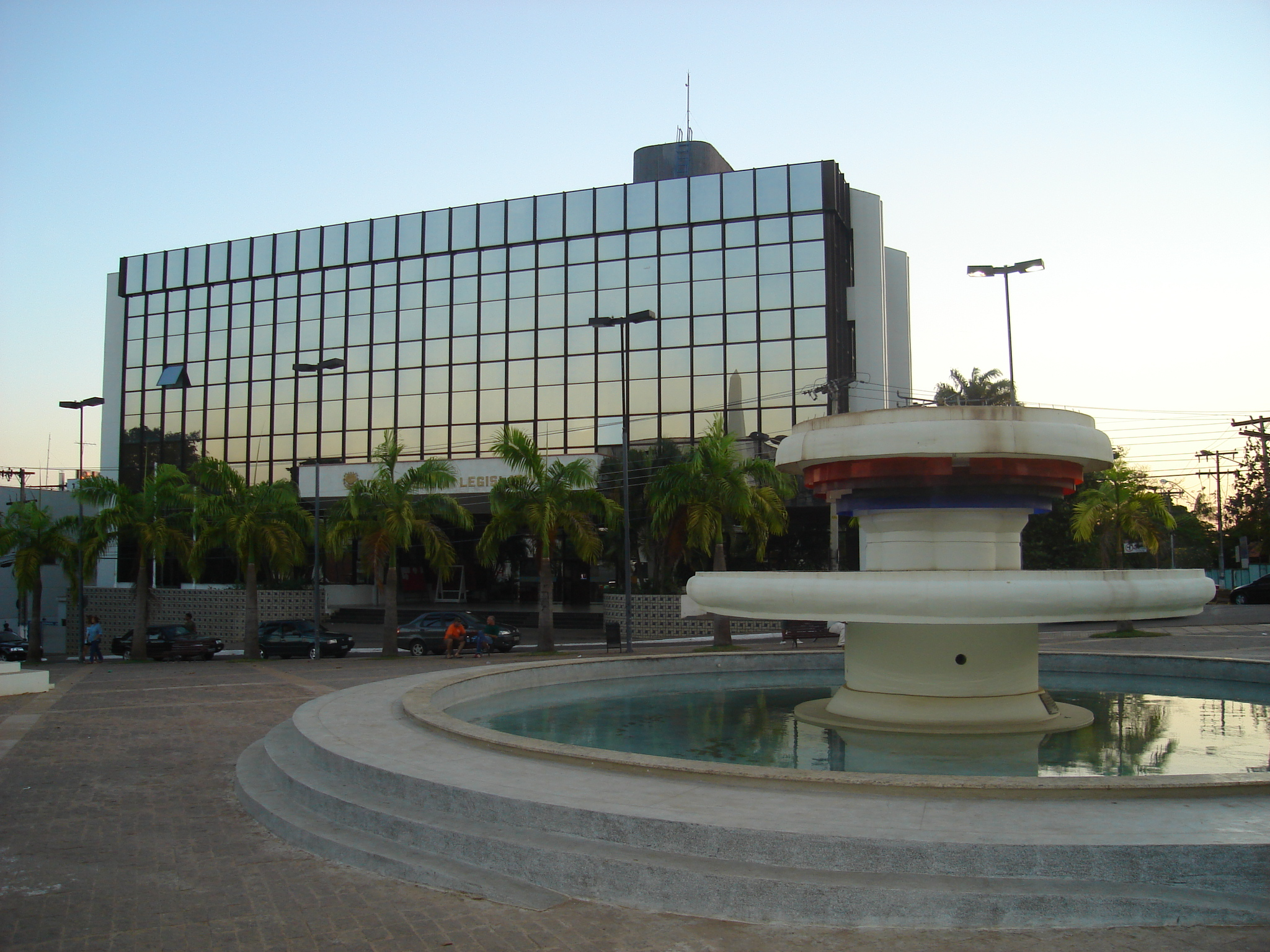 Assembléia Legislativa do Acre, Rio Branco, Acre, Brasil Fonte Autor: Filipe Mesquita de Oliveira --Filipe Mesquita responde20px 02:07, 27 Julho 2006 (UTC)